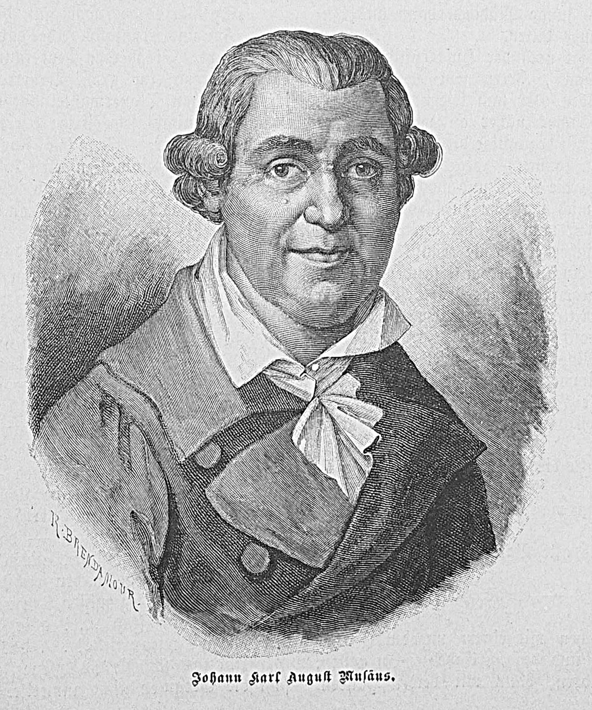 Bild aus Seite 709 in "Die Gartenlaube". Image from page 709 of journal Die Gartenlaube, 1887.